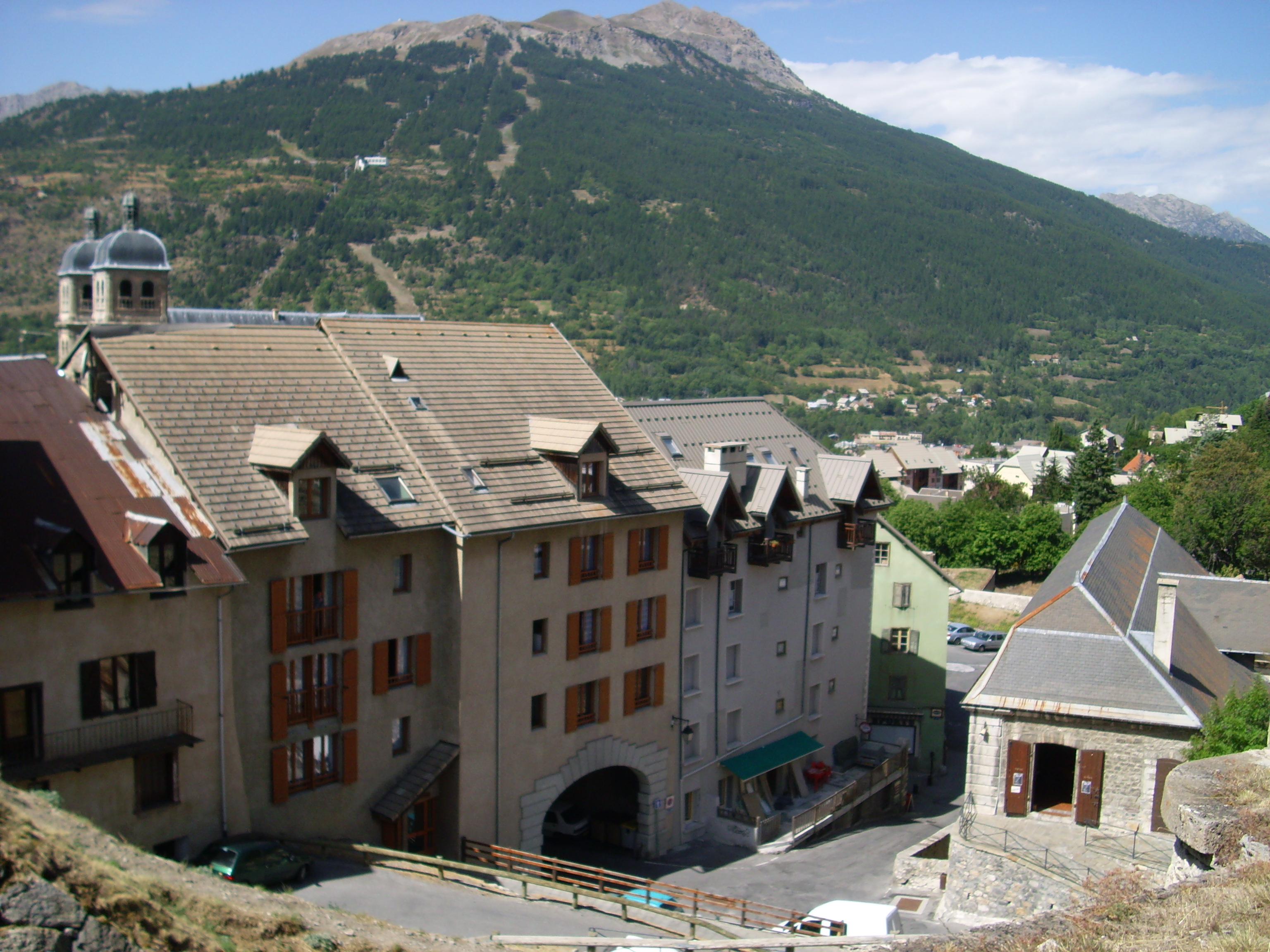 La cittadina di Briançon, Francia